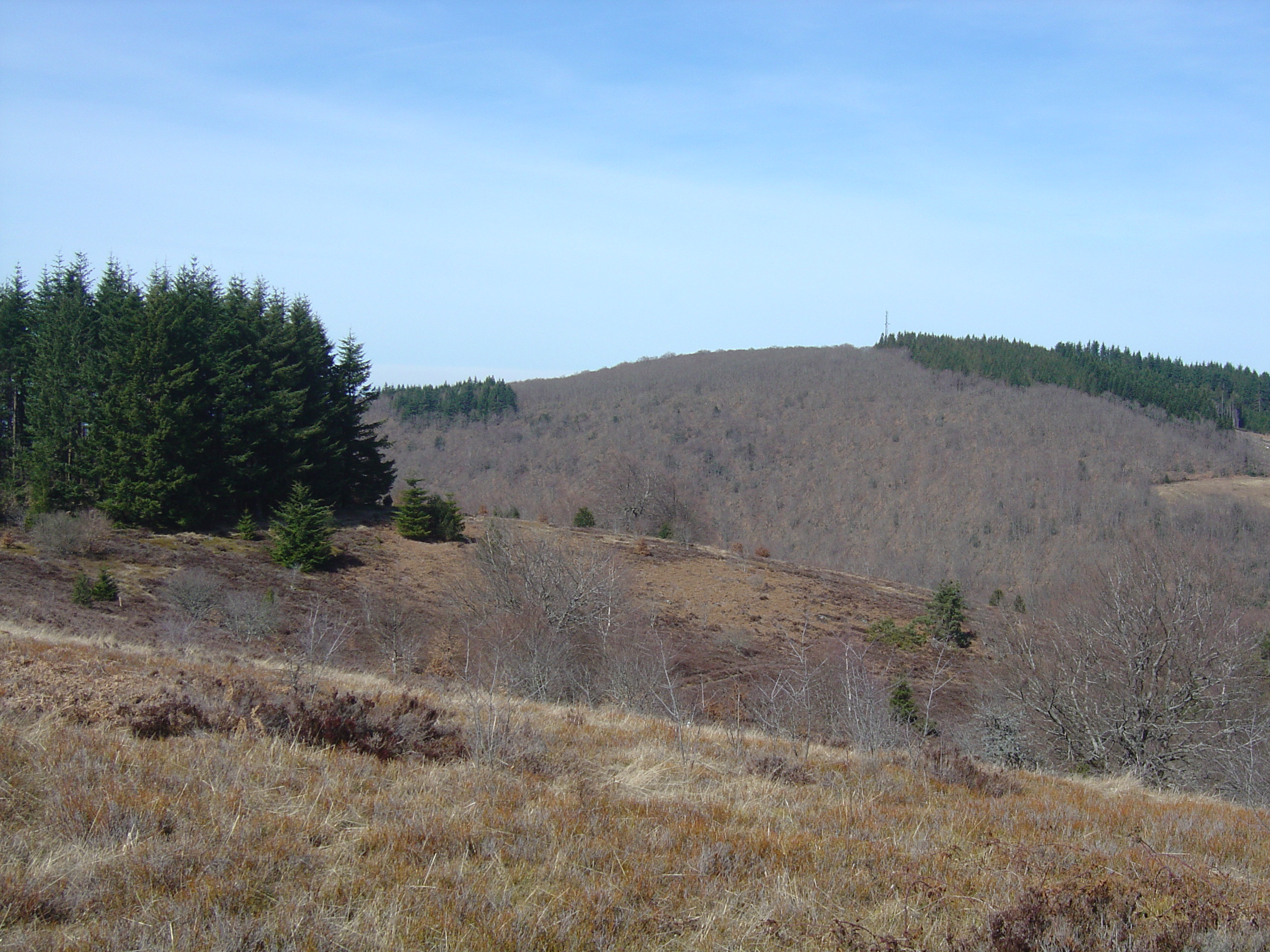 Le Puy des Monédières